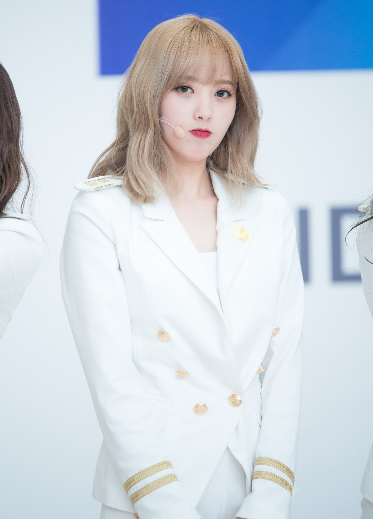 180211 더유닛 유닛G